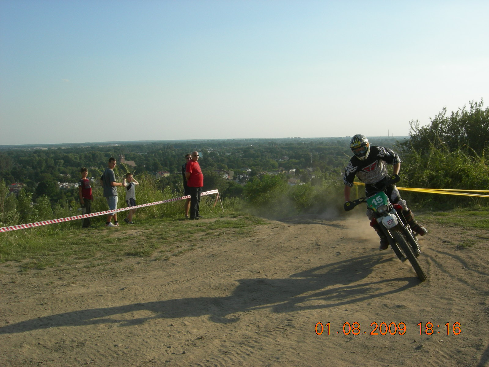 Zawody motocyklowe enduro na Rudzkiej Górze w sierpniu 2009